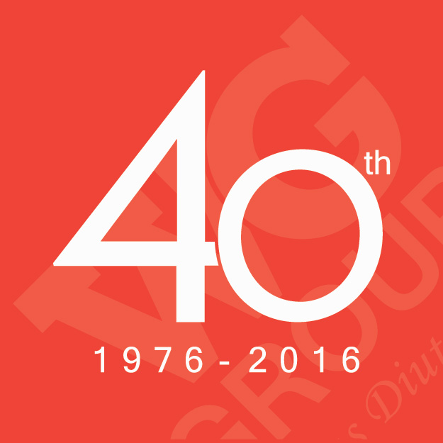 Logo WG Property